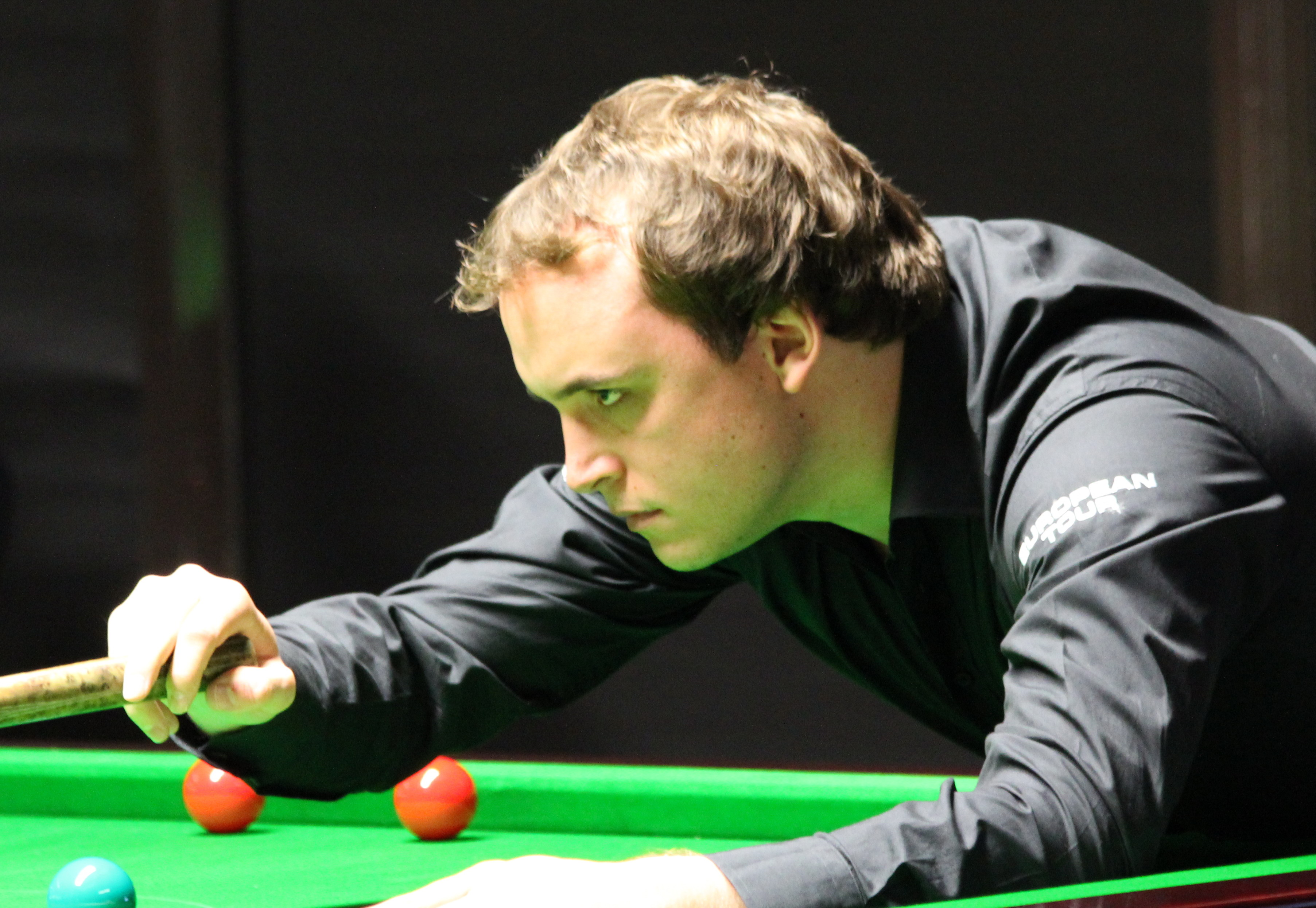 Sam Baird beim Paul Hunter Classic 2014